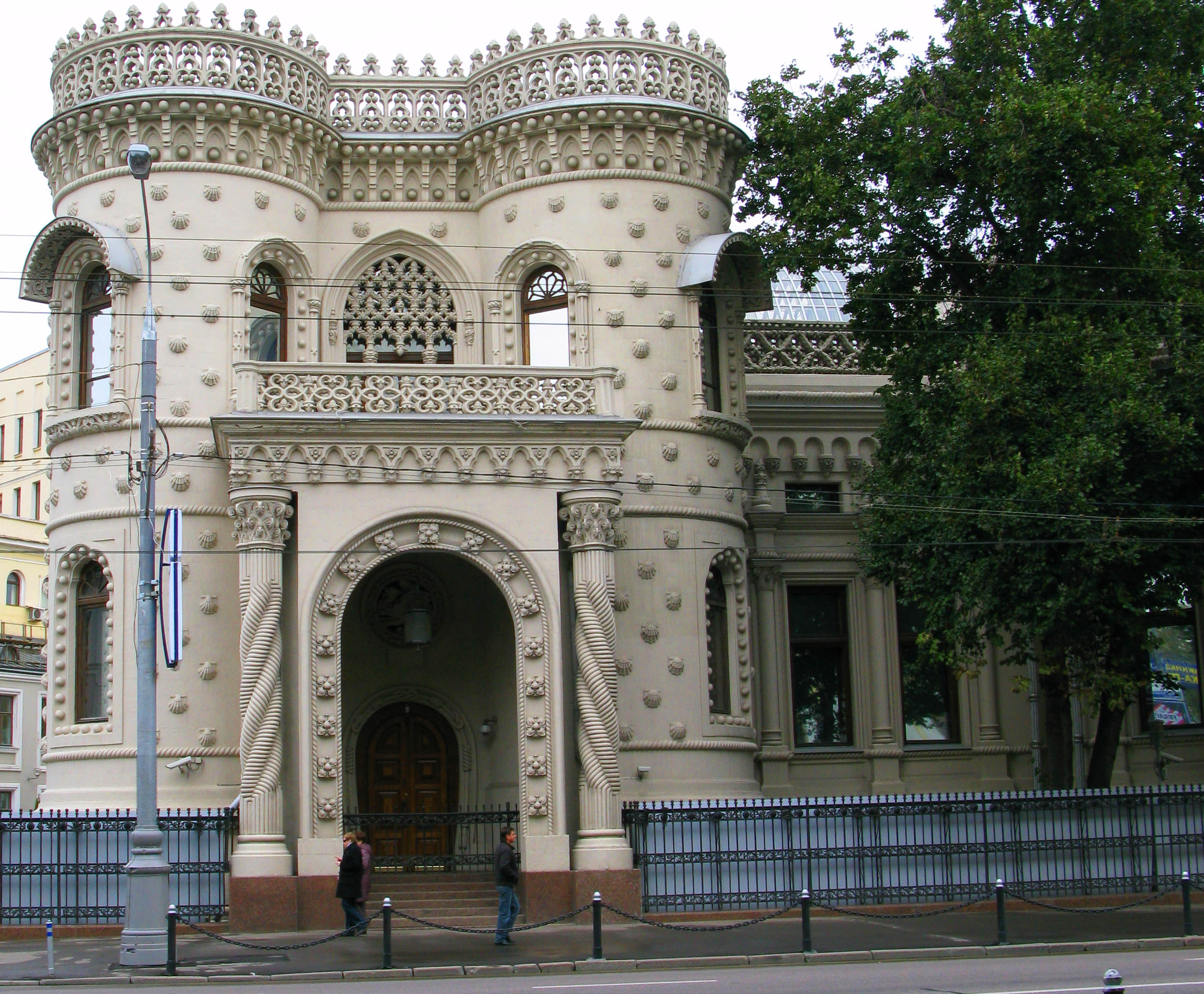 Усадьба Морозова А. А. (Москва и Московская область, Москва, Воздвиженка улица, 16)